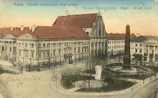 Kalisz, Poland, pl. św. Józefa, ca 1910